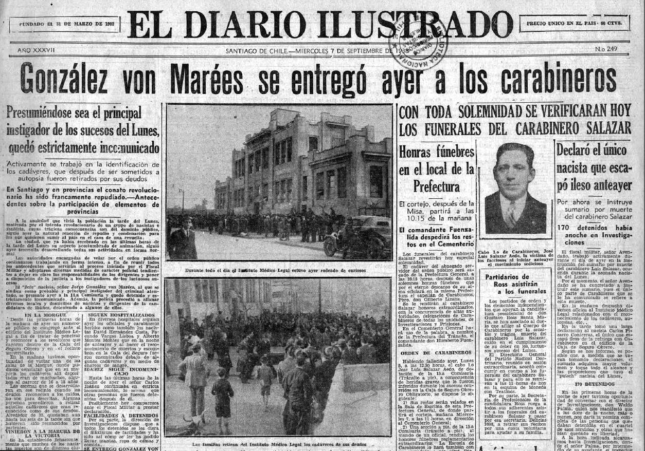 Portada de "El Diario Ilustrado" después de la Matanza del Seguro Obreo